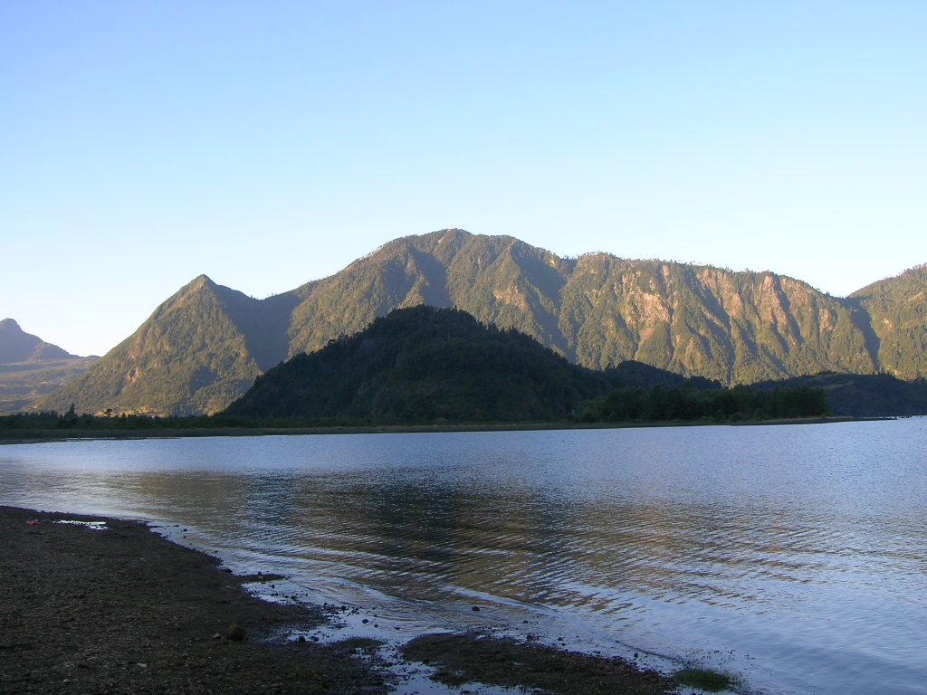 Lago Pellaifa, Chile